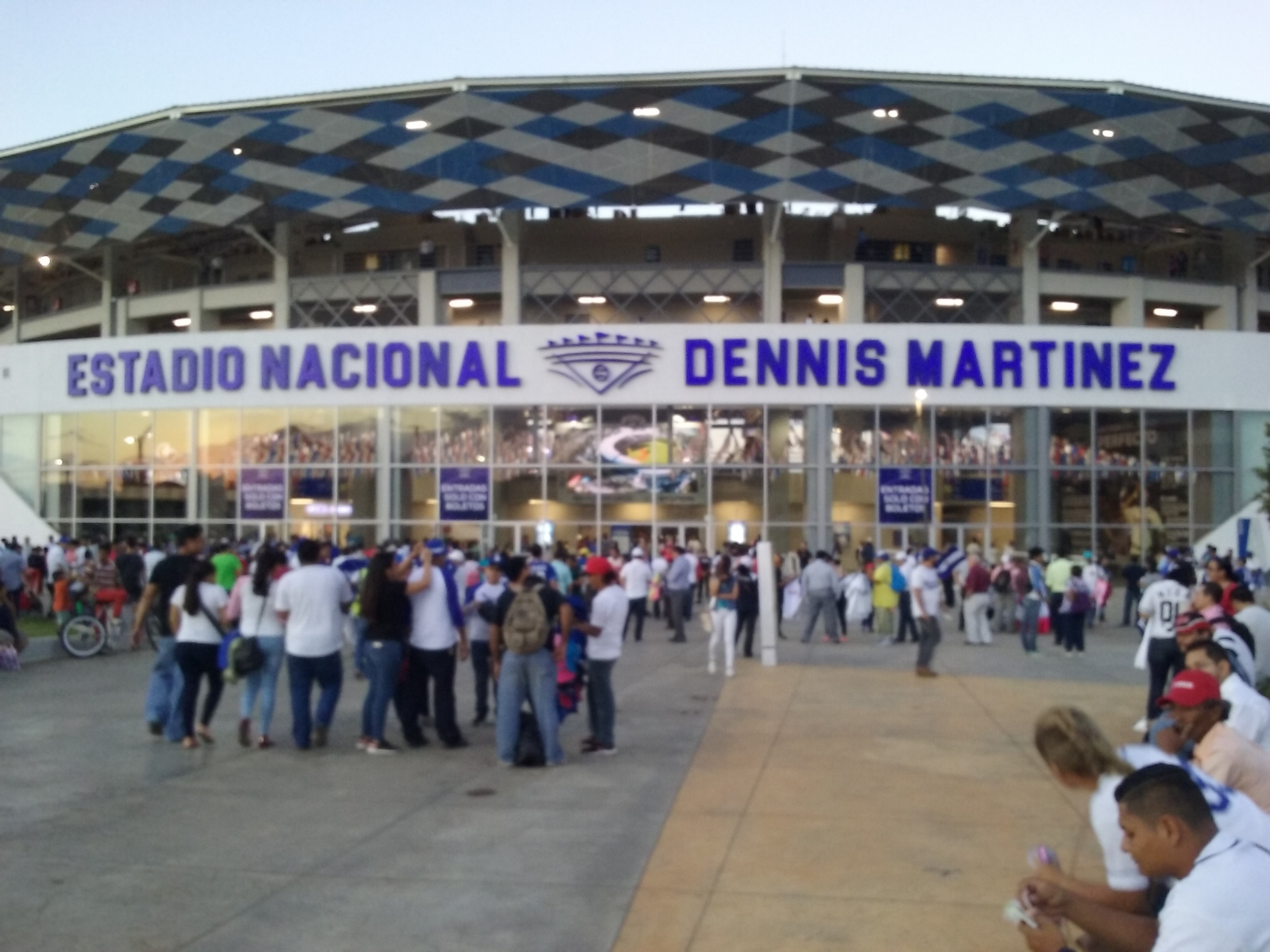 Estadio Nacional Dennis Martinez